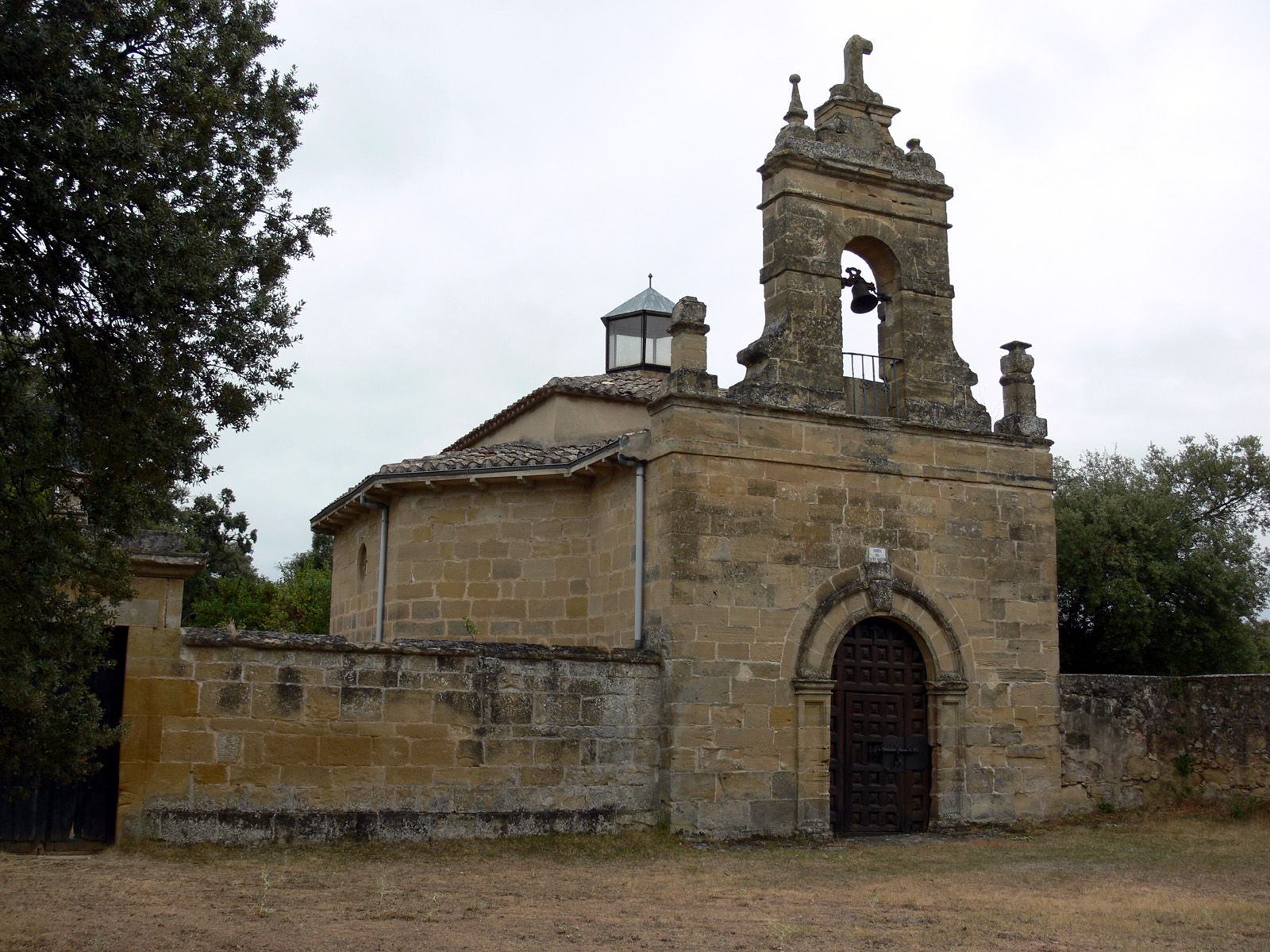 Ermita de la Virgen del Buen Suceso en Cidamón, La Rioja - España.